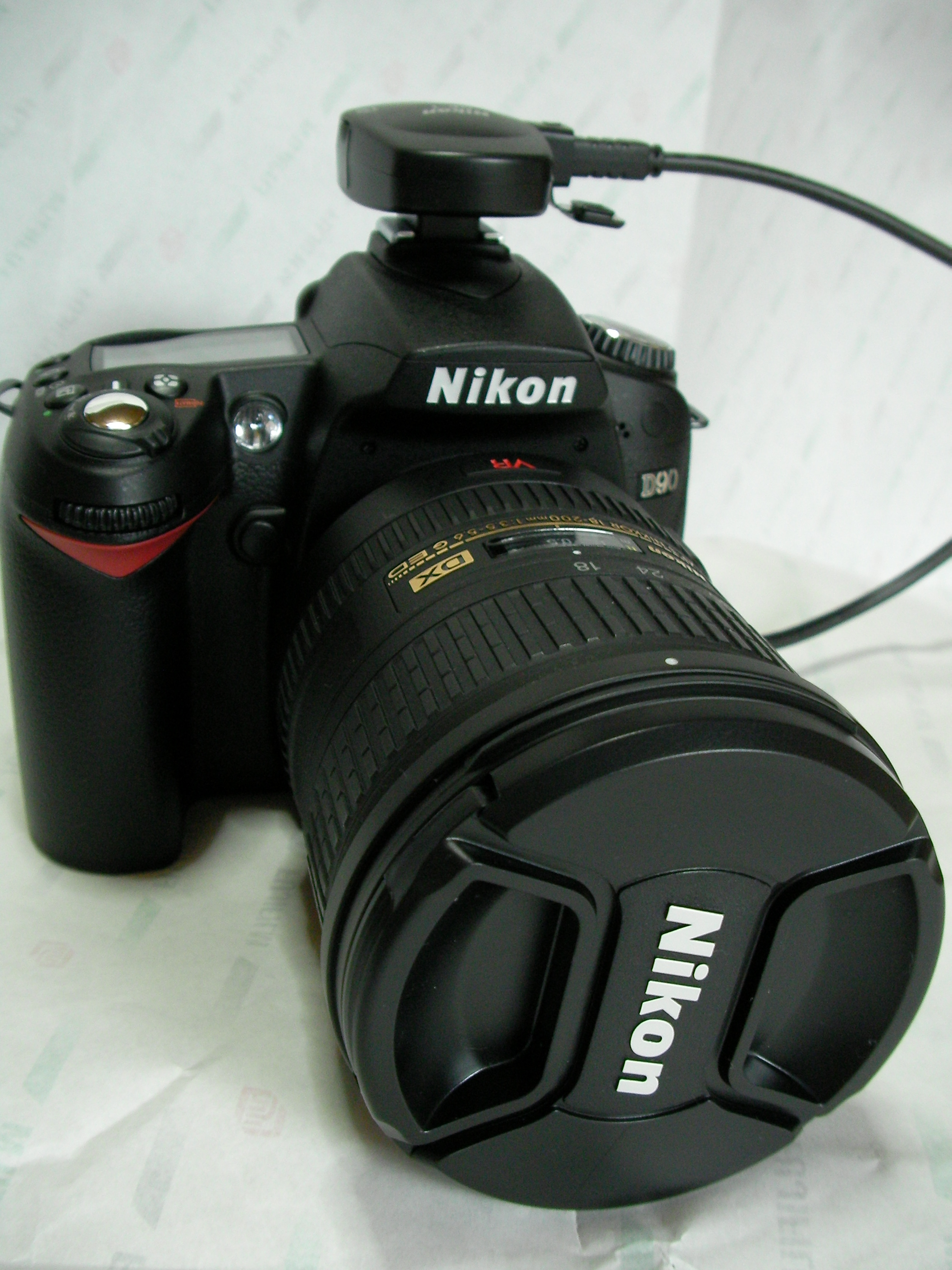 Nikon GPS GP-1 & D90